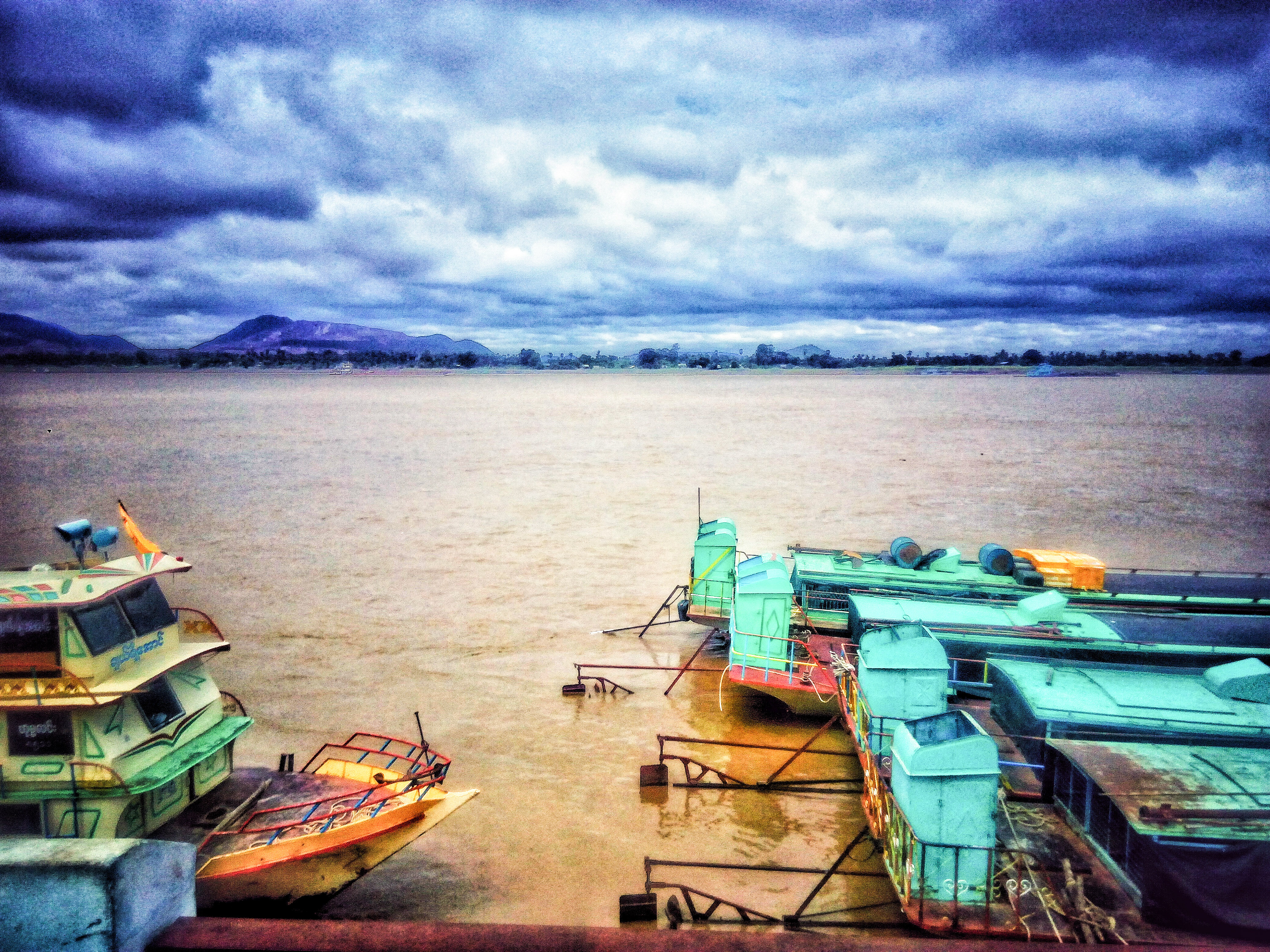 Човни на річці Чіндвін